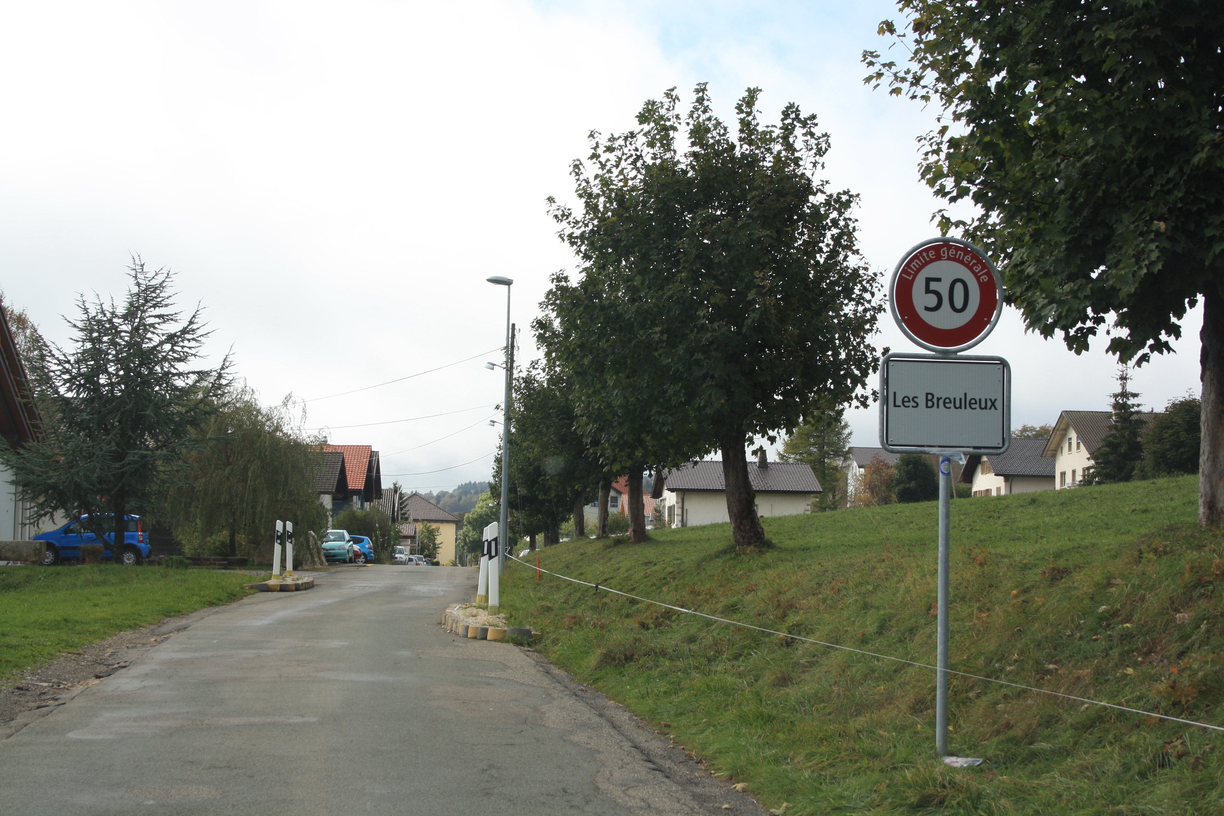 Les Breuleux